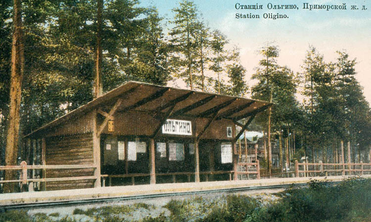 Железнодорожгая станция Ольгино до 1917 года на открытке